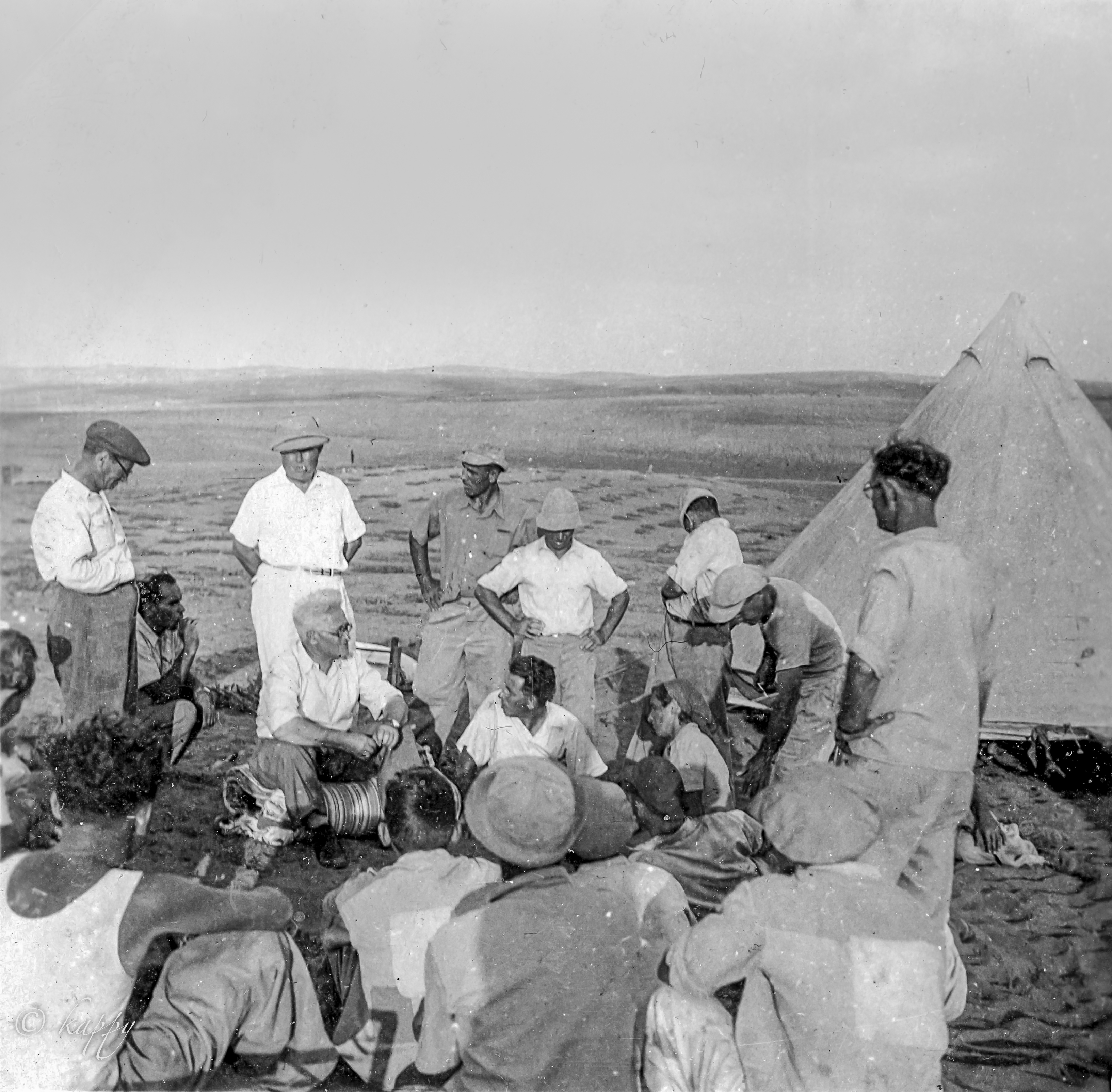 יום העליה לקרקע 28.8.1942 סומסום- קבוץ גברעם (עוד לא היה שם לקיבוץ) בתמונה רואים את אברהם הרצפלד יושב משמאל עם משקפיים. מעליו עומד צוקרמן, סרסור קרקעות מטעם הקק"ל, ומסביבם חברים ביום העליה על הקרקע. באדיבות ארכיון גברעם. התמונה המקורית נמצאת גם באוסף התמונות של יהודה רוטשילד ב"ביתמונה".